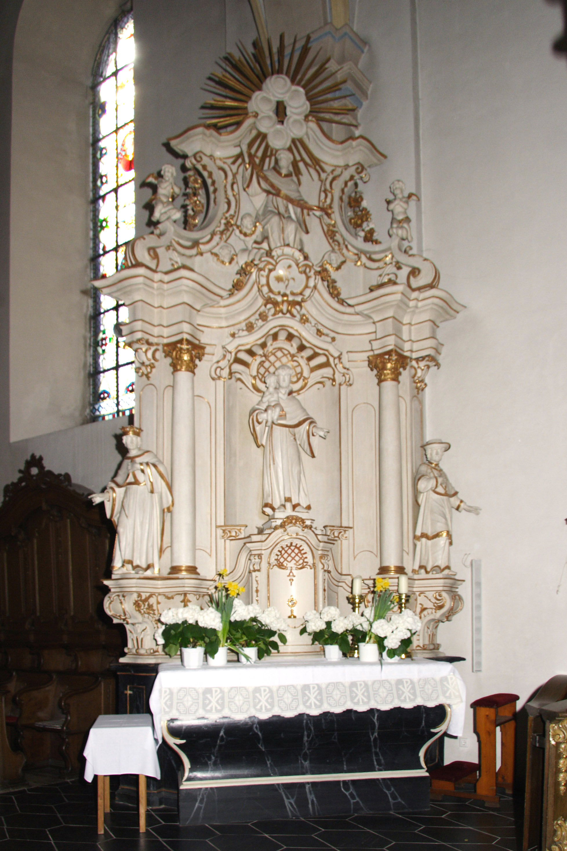 Rechter Seitenaltar der Nikolaikirche in Brilon